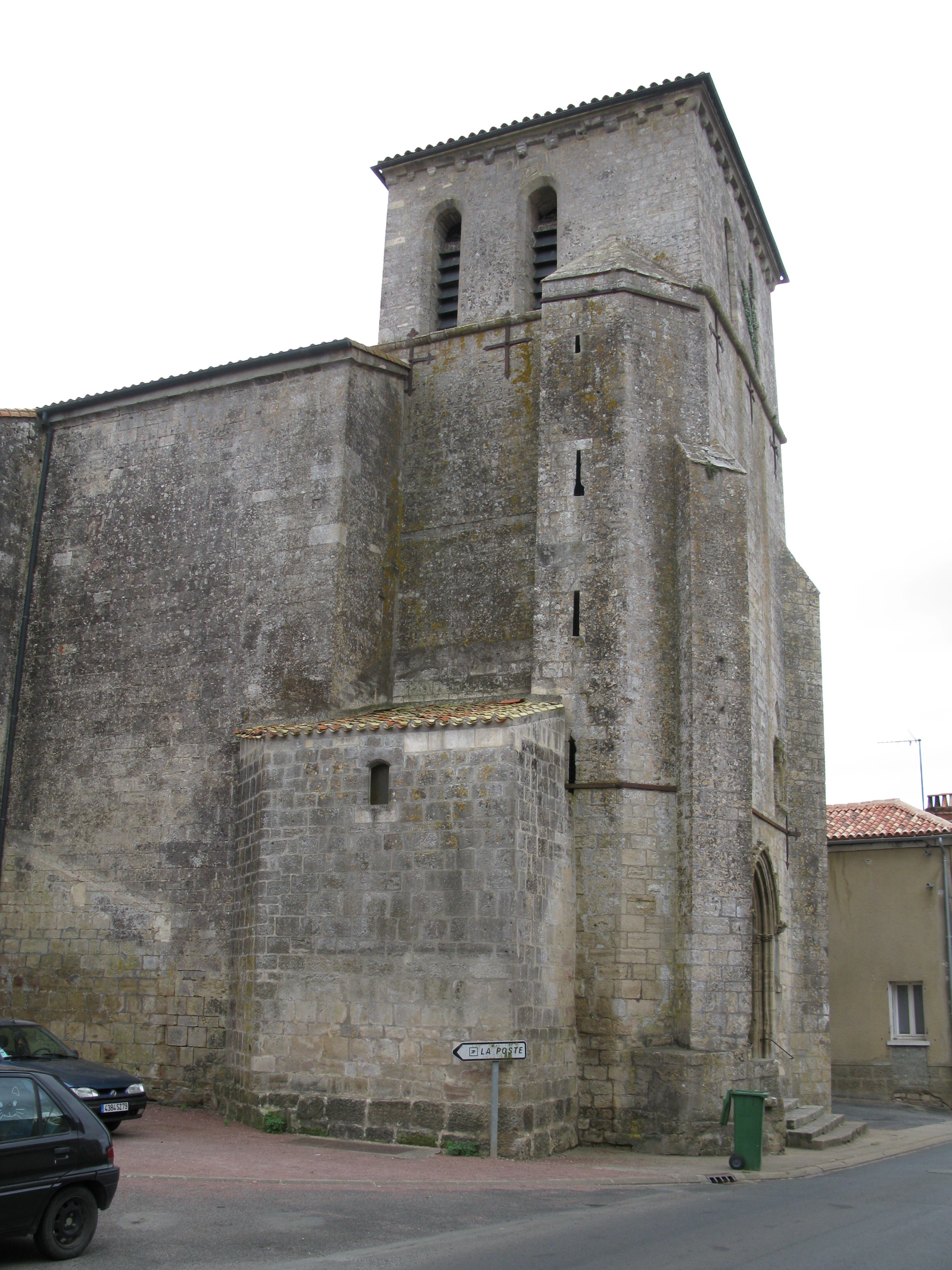 Église d'Ardin